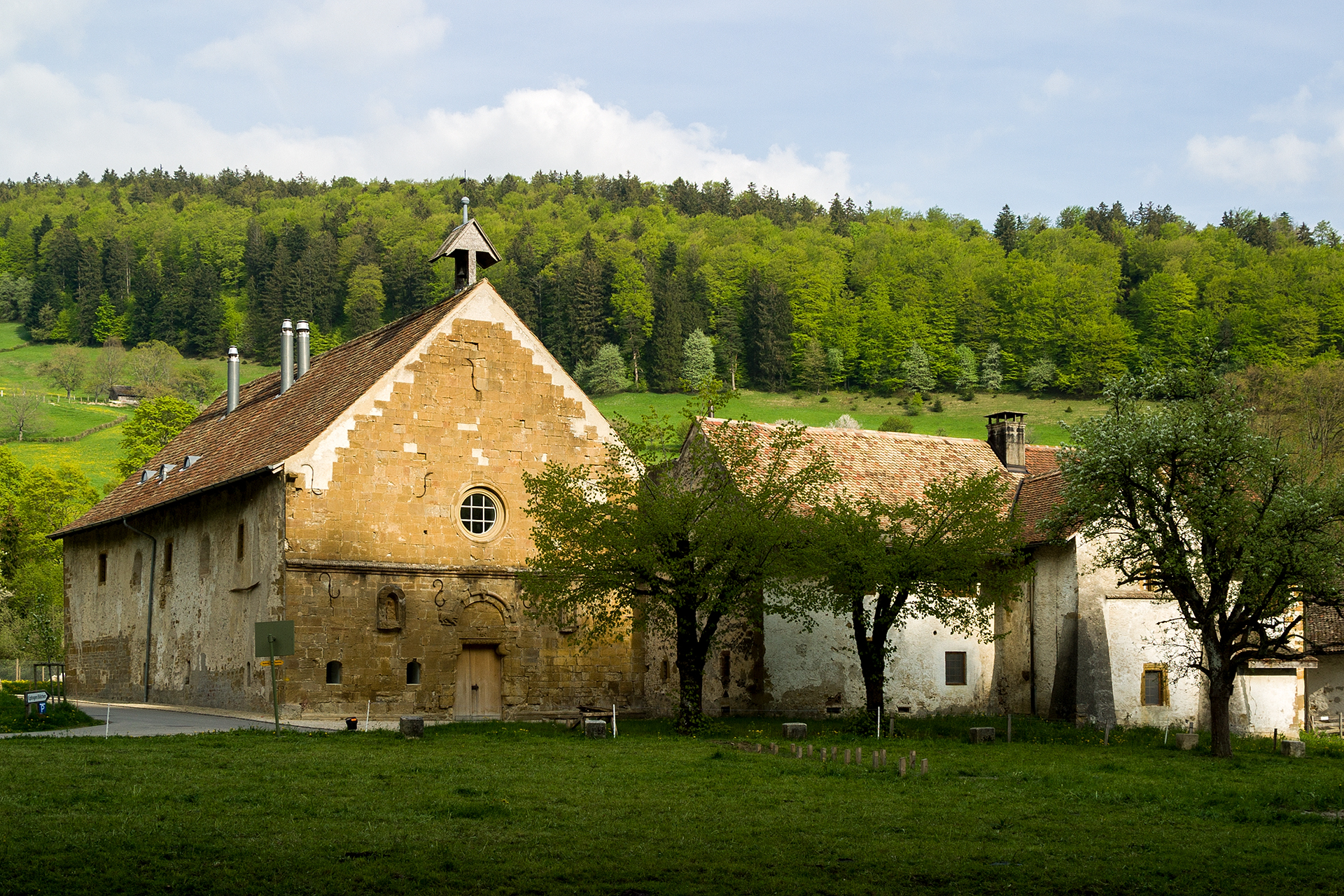 Kloster Schöntal in Langenbruck (BL)